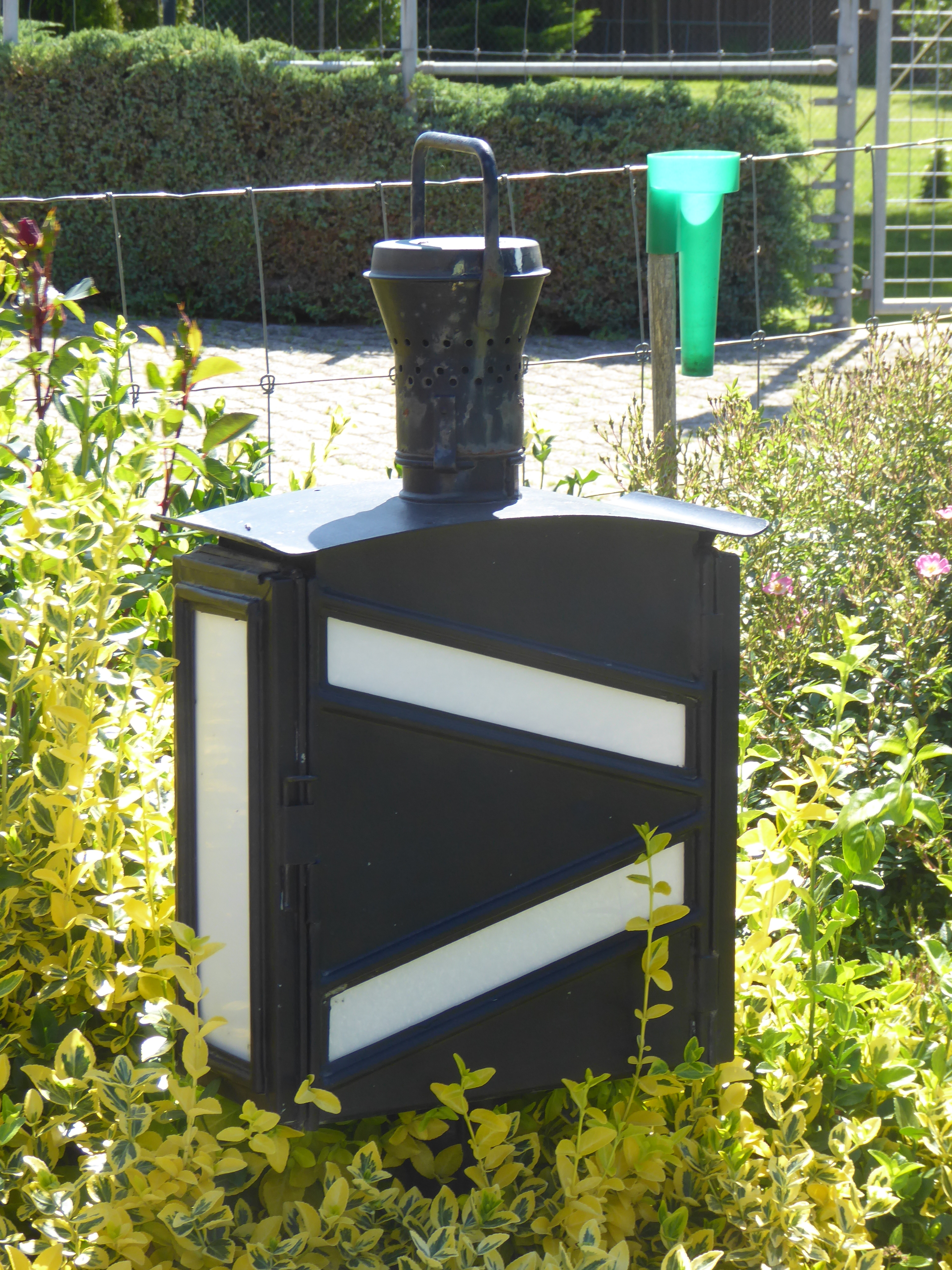 Ausgediente Weichensignallaterne in einem Garten in Wildensbuch ZH. Modell der schweizerischen Eisenbahnen seit 1898/1899 nach dem Vorbild der Badischen Staatseisenbahnen.